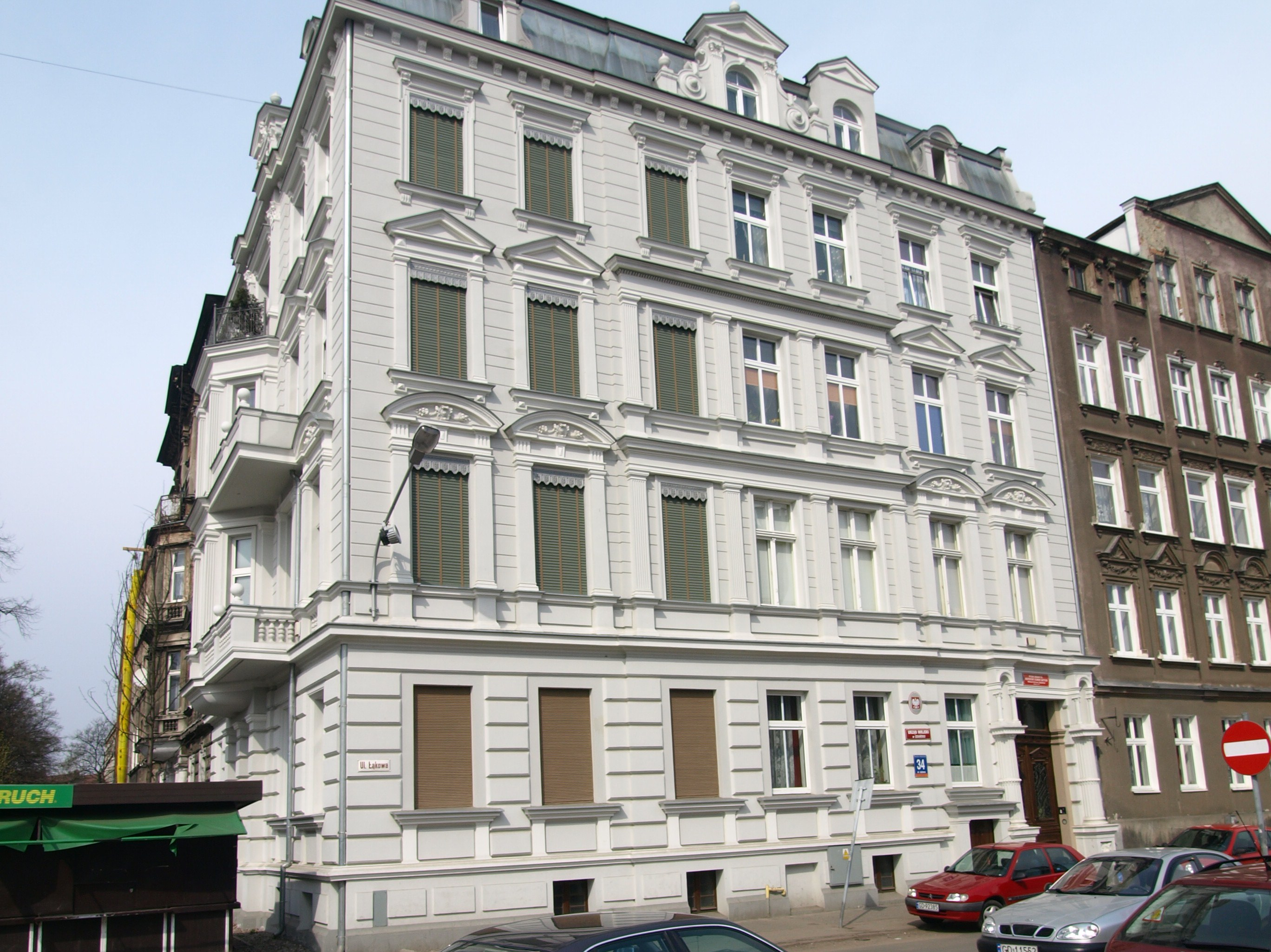 Gdańsk Dolne Miasto, ul. Łąkowa 34 - kamienica, 1880